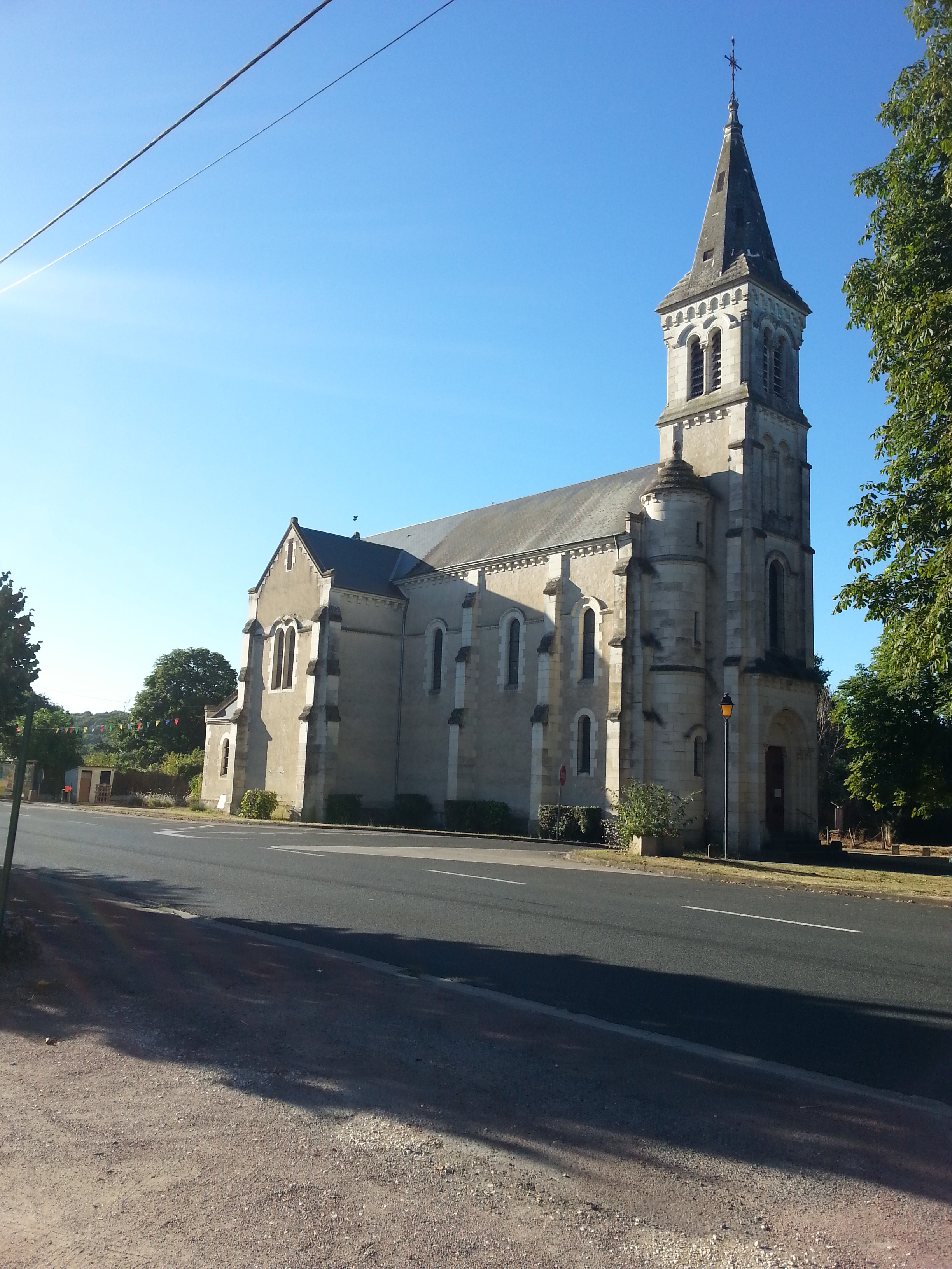 Chitray (36) : L'église Saint-Christophe.